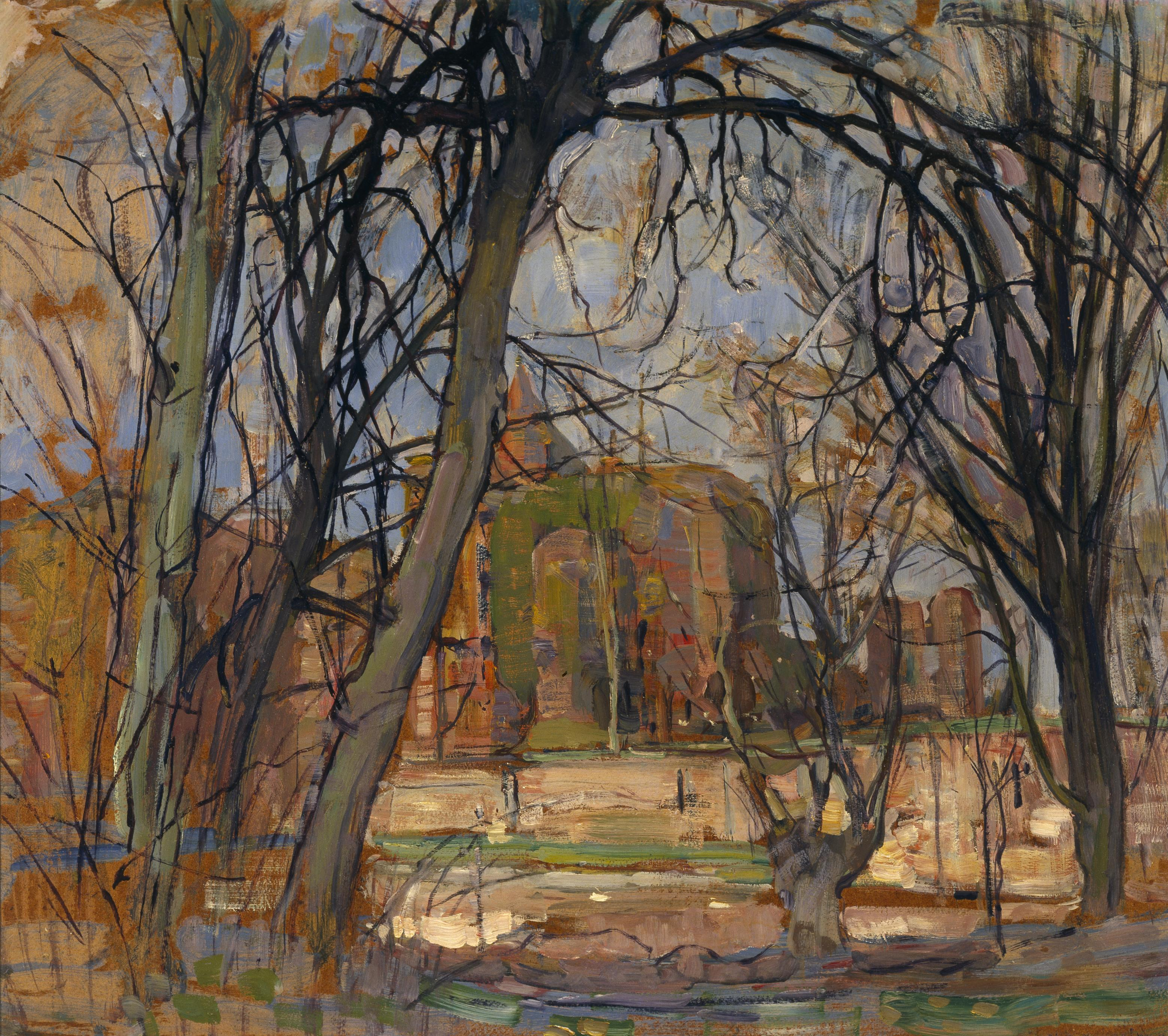 Spring sun (Lentezon): castle ruin Brederodelabel QS:Len,"spring sun (Lentezon): castle ruin Brederode"label QS:Lfr,"Soleil de printemps (Lentezon) : Cháteau en ruine : Brederode"